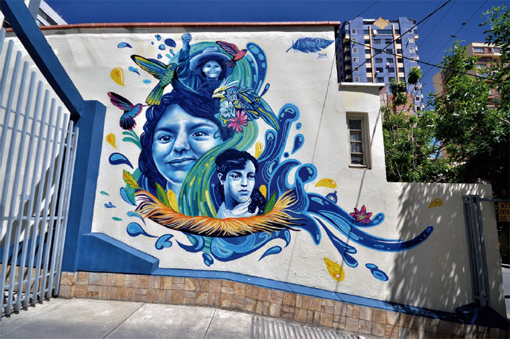 II Encuentro de Muralismo Latinoamericano